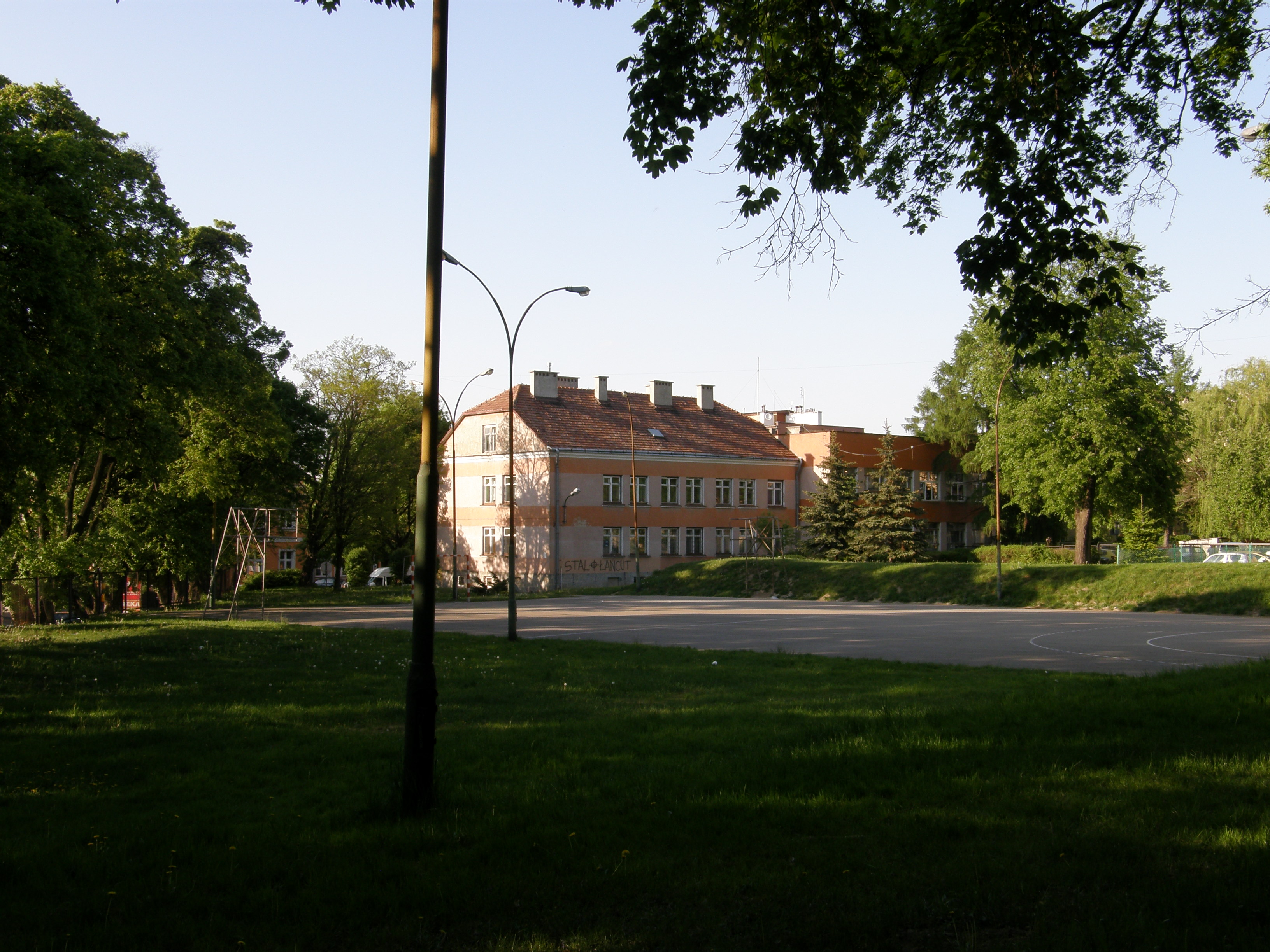 I Liceum Ogólnokształcące w Łańcucie - boisko